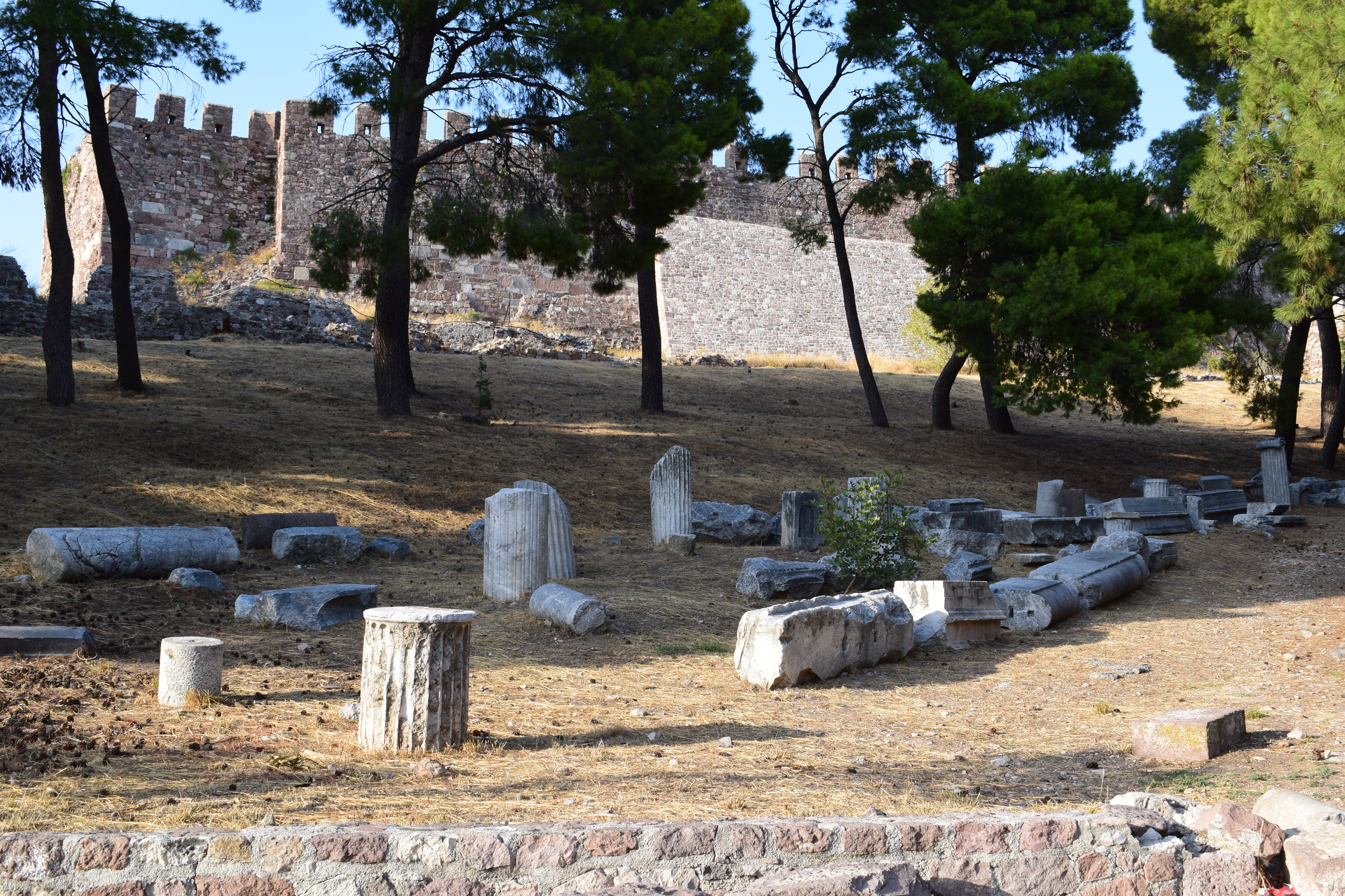 Κάστρο Μυτιλήνης«Κάστρο Μυτιλήνης»